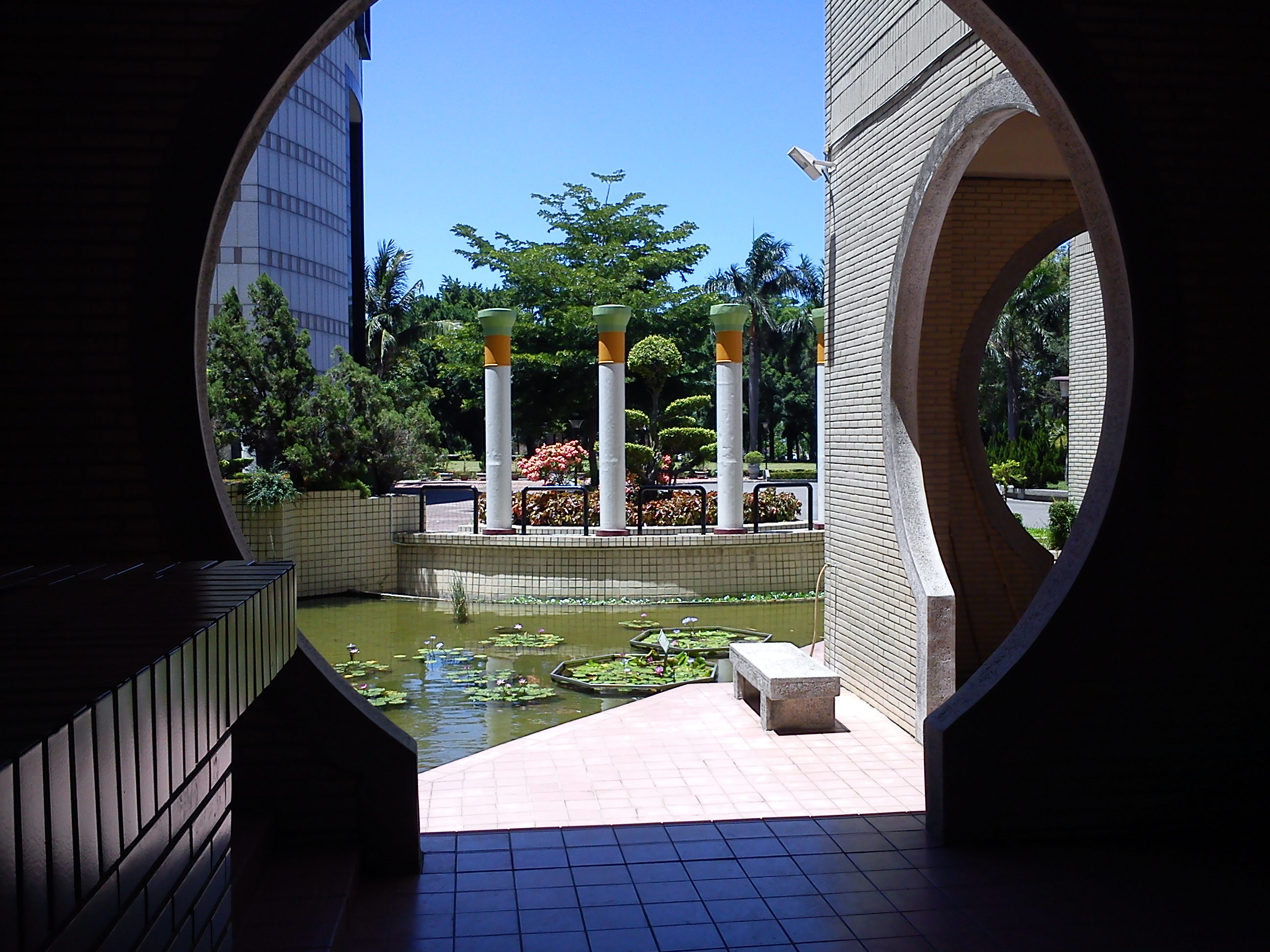 中文（台灣）: 中山高中行政大樓外蓮潭。